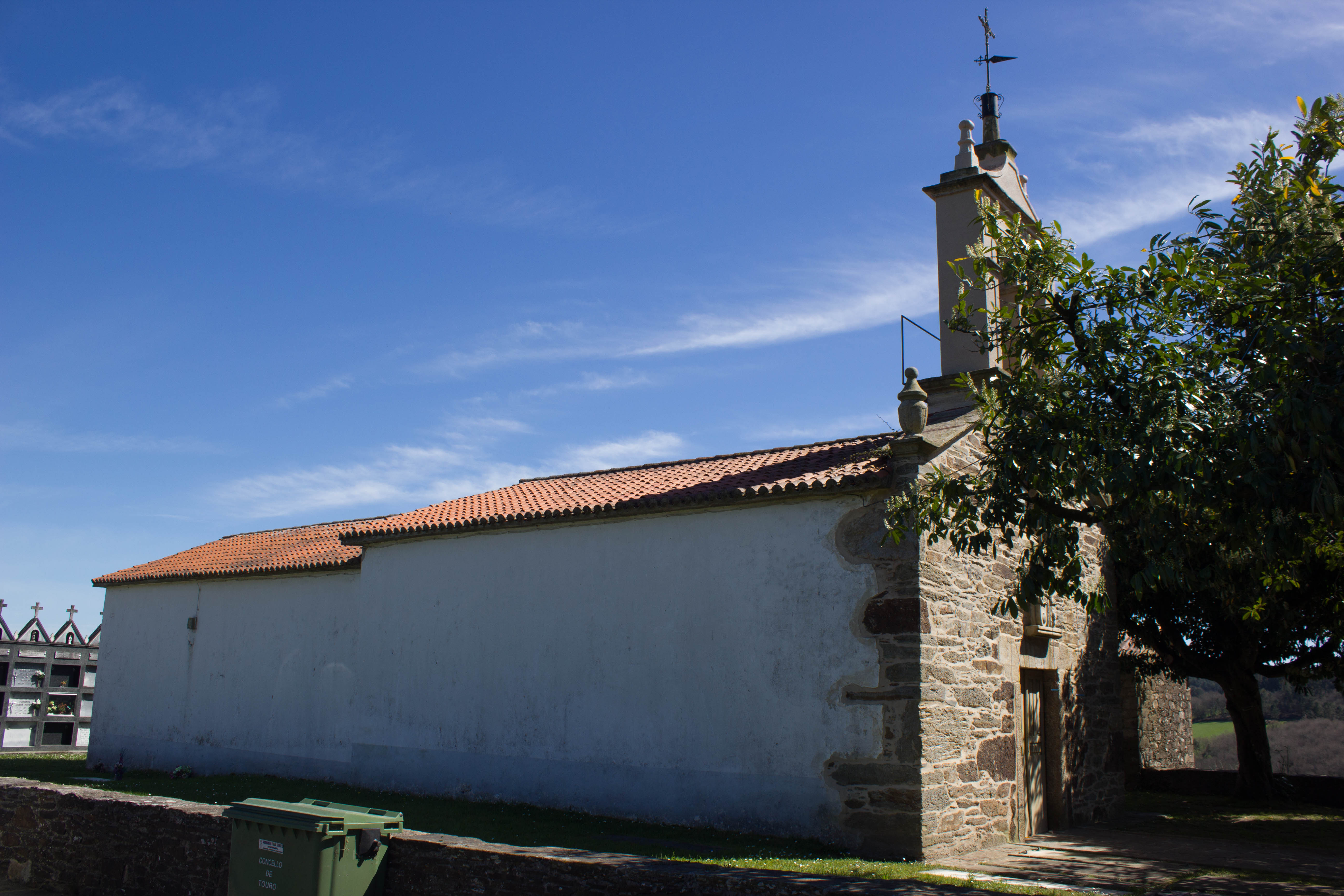 Igrexa de Santiago de Andeade, no concello de Touro.